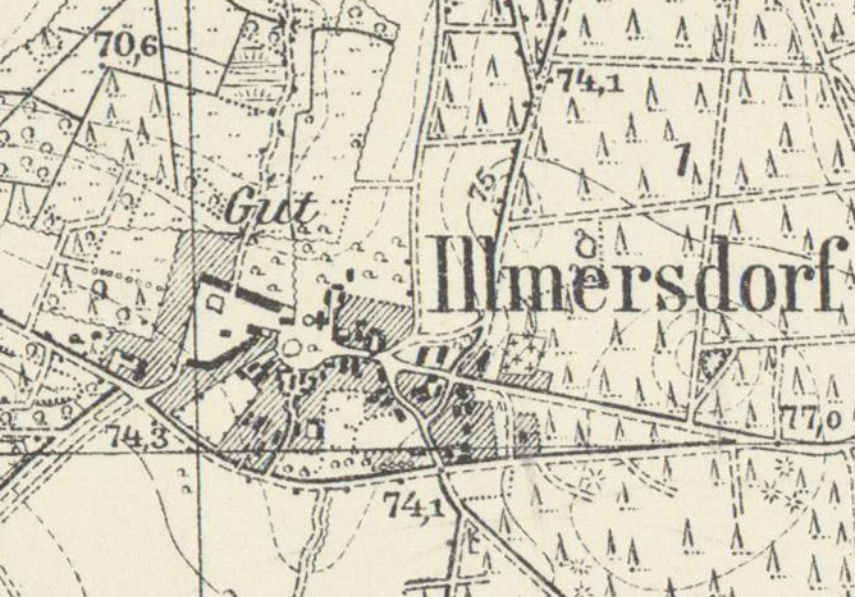 Illmersdorf, Gemeindeteil von Casel, Ortsteil der Stadt Drebkau, Landkreis Spree-Neiße, Brandenburg, Ausschnitt aus dem Messtischblatt 4351 Drebkau von 1919